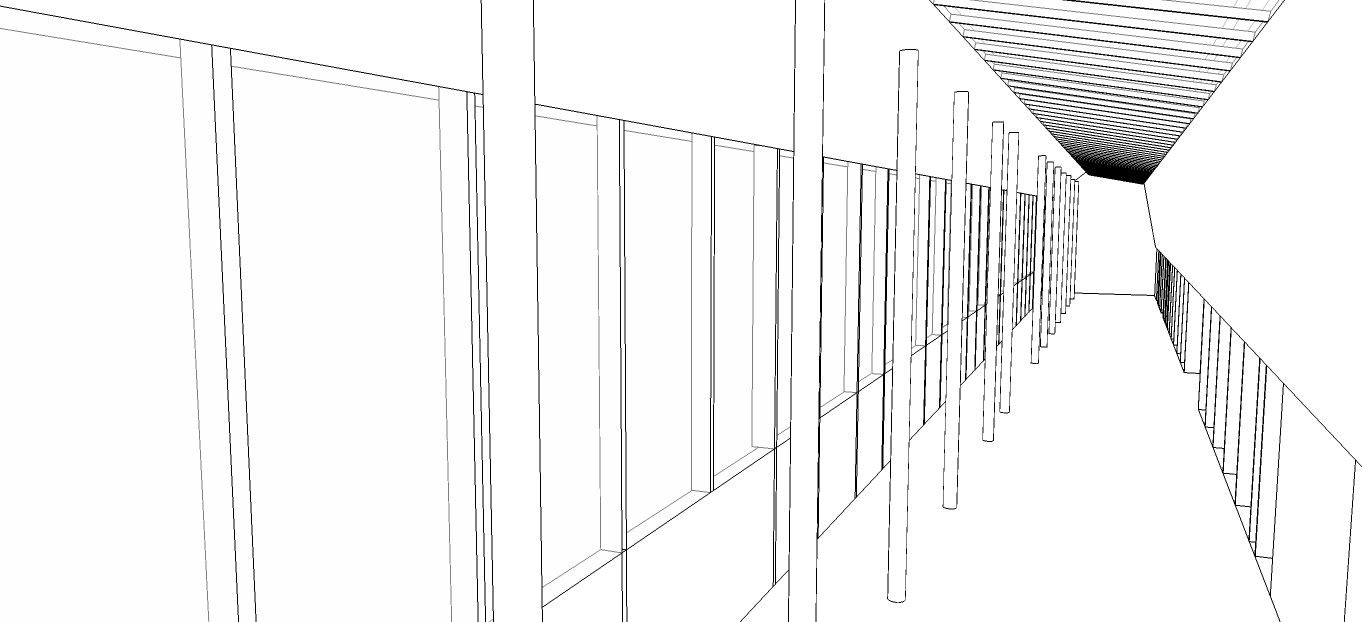 Template:Screenshotcopyrighted